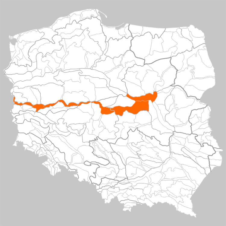 Physisch-geographische Regionen von Polen: Warschau-Berliner Urstromtal